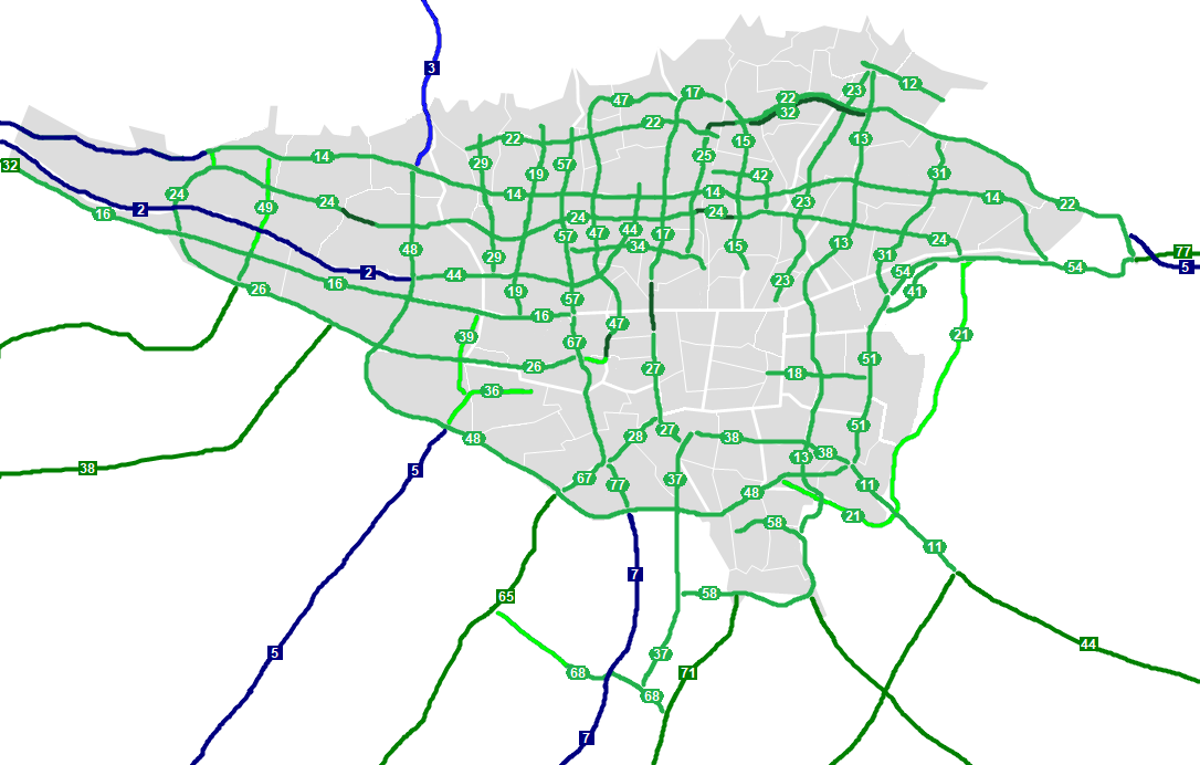 نقشه بزرگراه های شهر تهران و کدهای آنها